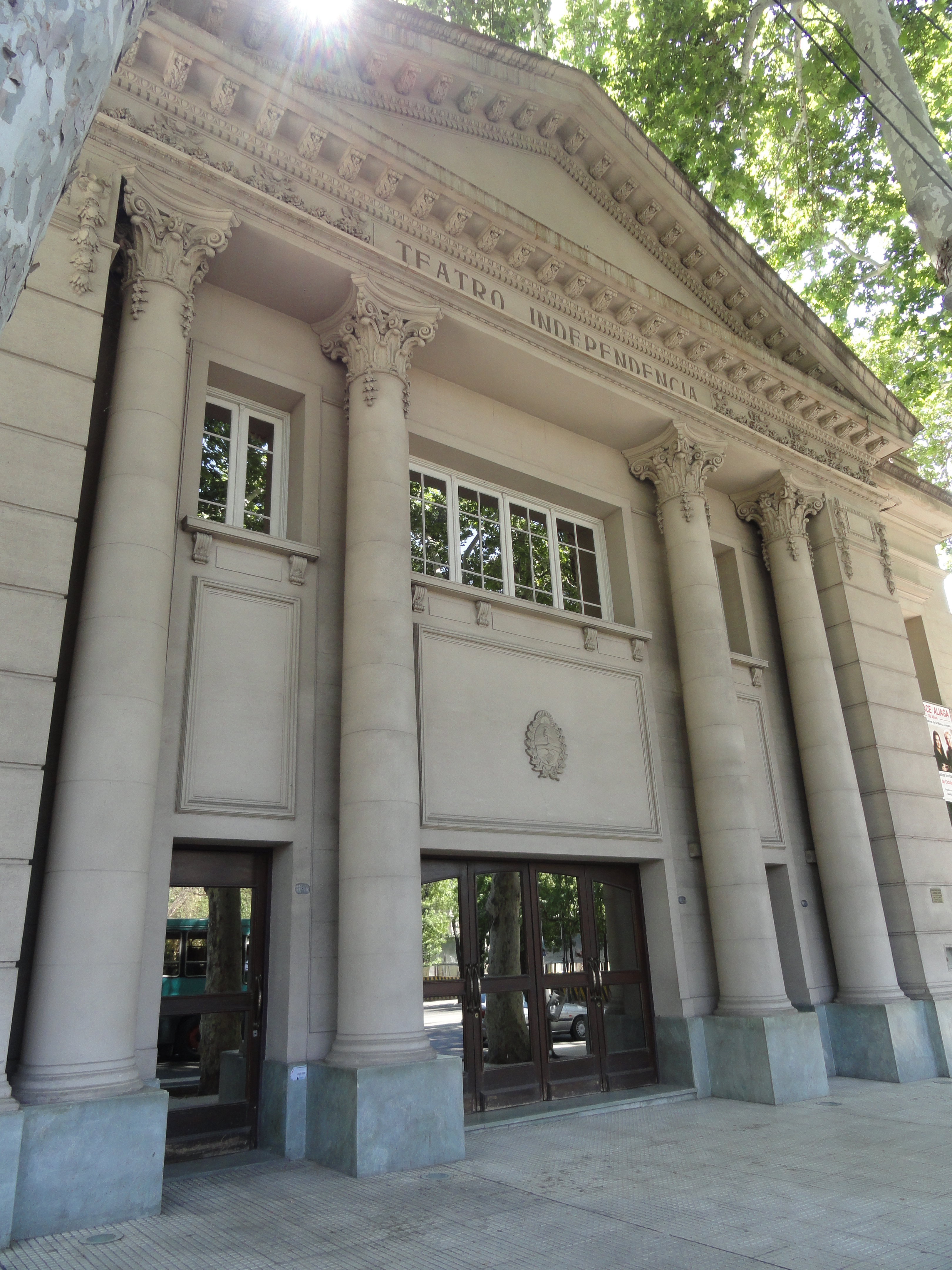 Fachada del Teatro Independencia